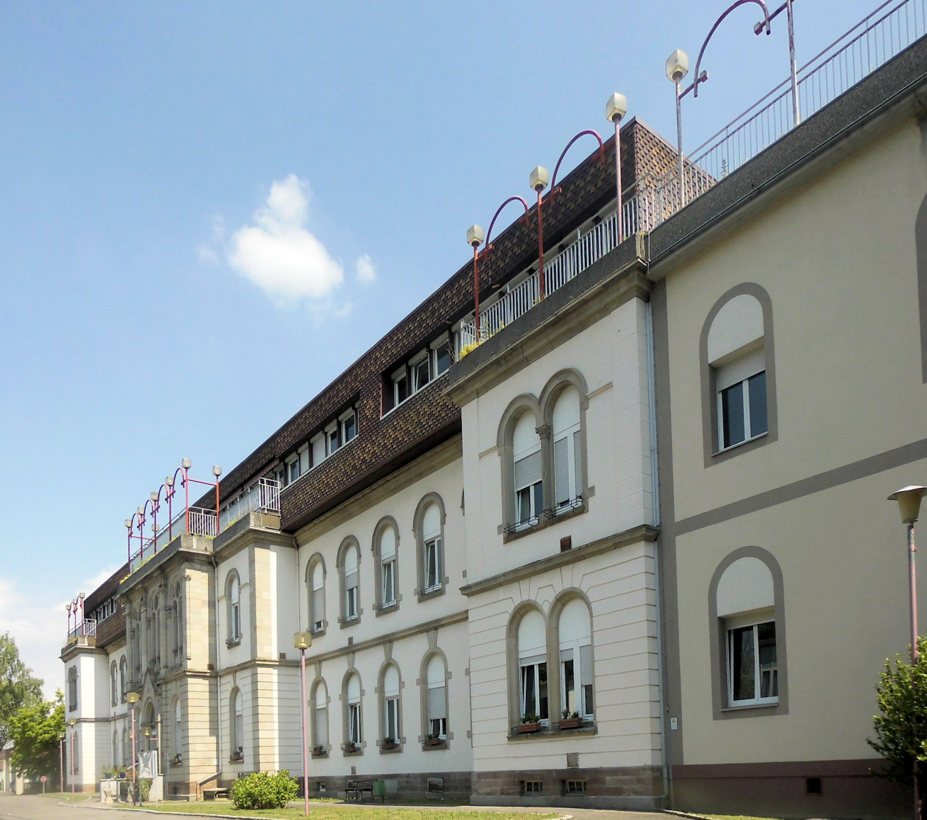 Le centre hospitalier à Sierentz